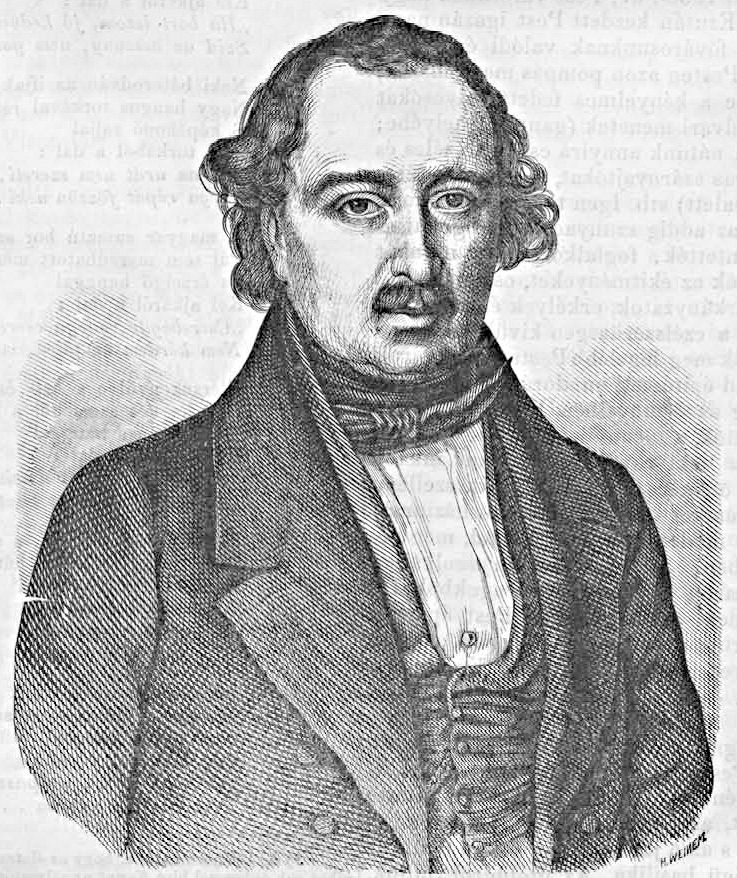 Hild József (1789–1876) építész. H. Weinem metszete. (Vasárnapi Ujság, 1861. április 21.)